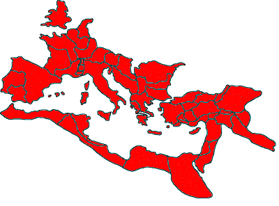 Roman empire